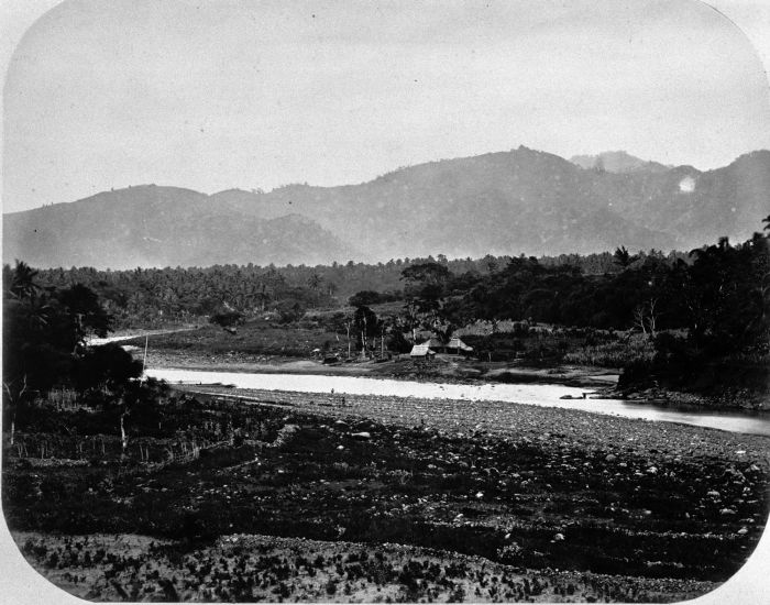 Foto. Een huis aan de Bogowonto-rivier bij Poerworedjo